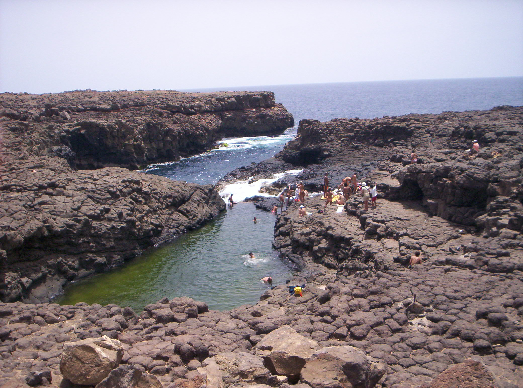 Piscina natural chamada "buracona", na ilha do Sal, em Cabo Verde.